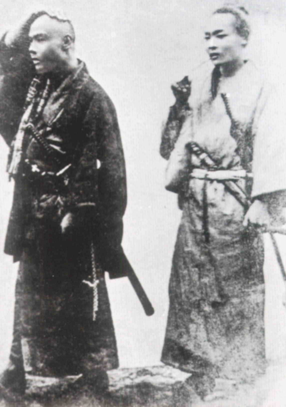 黒田清隆 左の人物。榎本武揚助命の為、剃髪した写真。